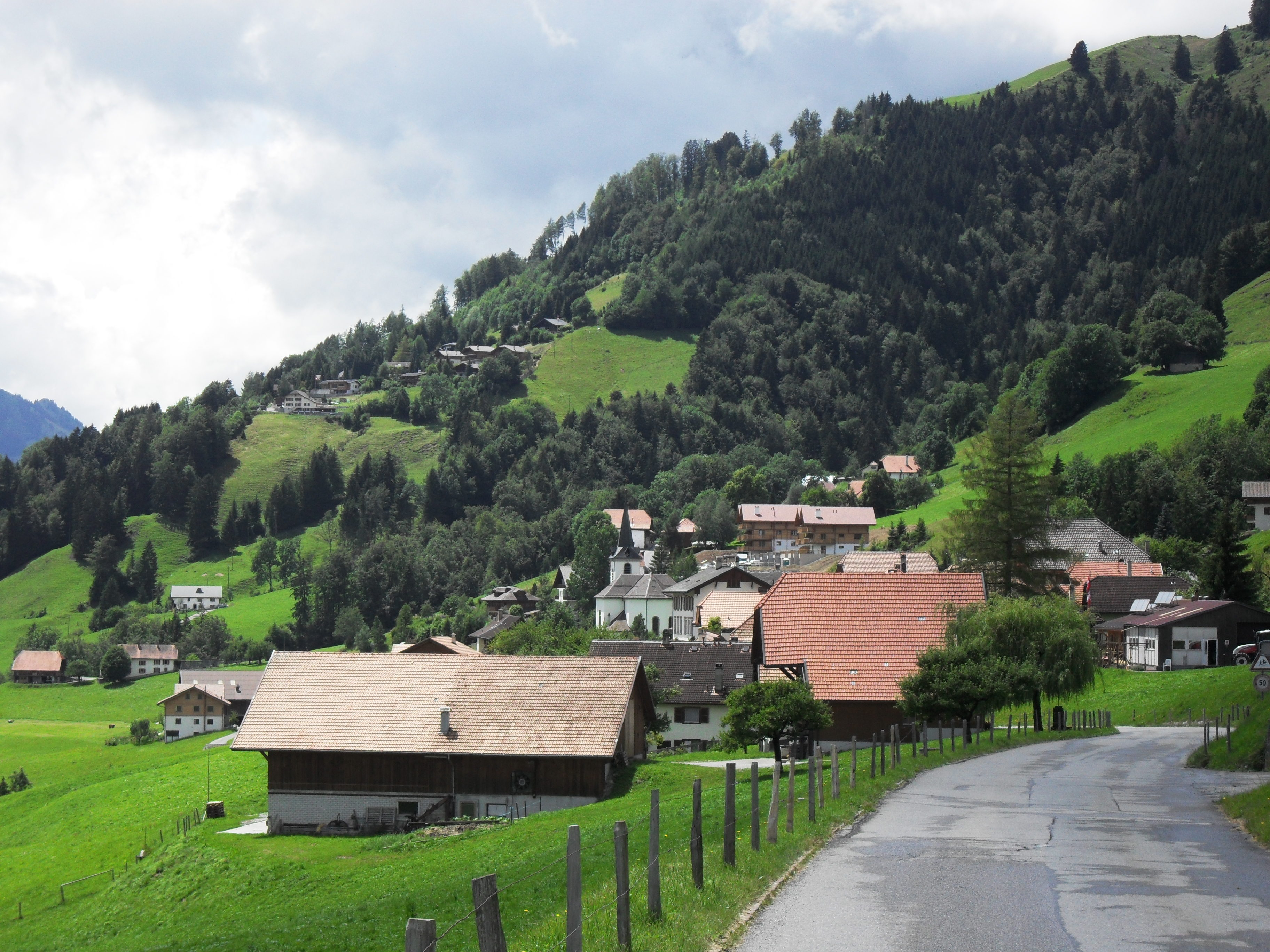 Au village de Cerniat, vu de la sorti du village Object location46° 38′ 08.97″ N, 7° 09′ 46.18″ E